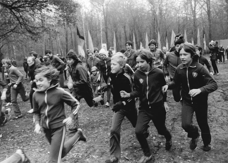 Berlin, Willi-Sänger-Gedenklauf, Jugendlauf ADN-ZB Rehfeld-18.11.79-str-Berlin: Willi-Sänger-Gedenklauf- Bereits vor dem Star zum Hauptluaf, mit dem der antifaschistische Sportler Willi Sänger geehrt wird, machten hunderte Berliner von der Möglichkeit eigener sportlicher Betätigung Gebrauch. Sie konnten dabei zwischen der Olympiameile (Foto) und einem 6-km-Lauf für jedermann wählen.